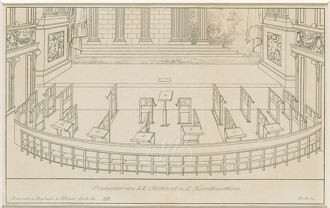 Bühne und Sitzplan des Orchesters im Kärntnertortheater Wien, 1821 - Lithographie von Franz Xaver Stöber